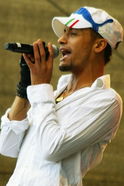 Mark Medlock in Vienna, 2008